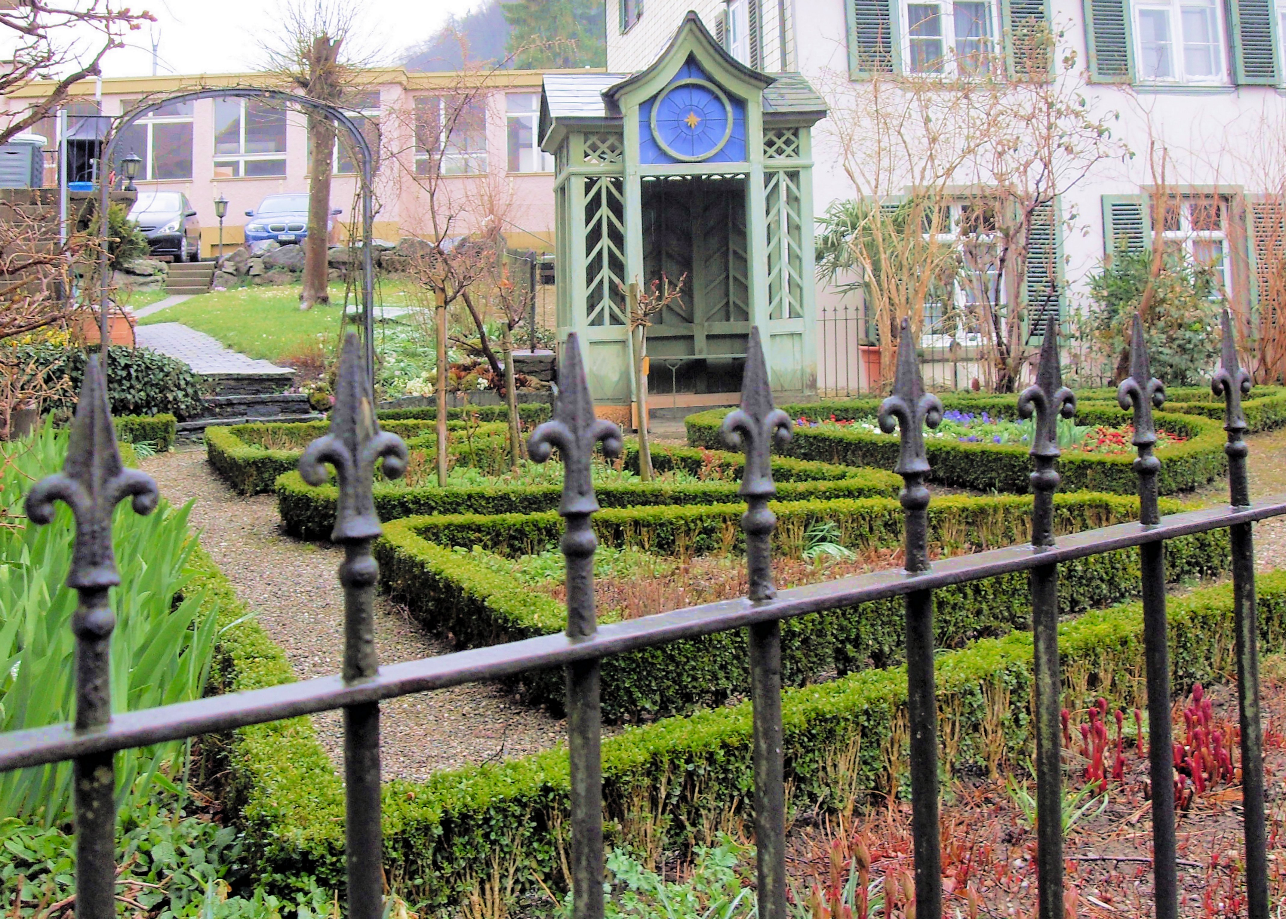 Dietrich-Ziergarten in Berlingen, Kanton Thurgau, Schweiz